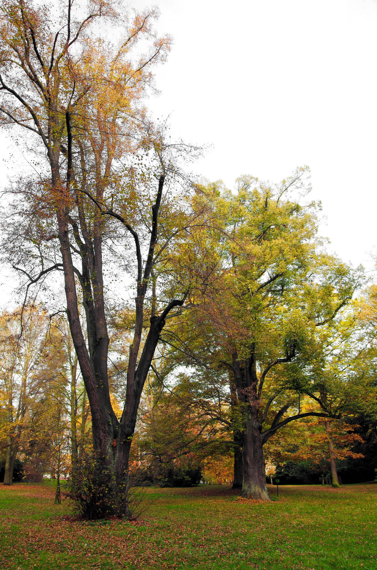 Památné stromy Dalovické lípy, Dalovice, okres Karlovy Vary